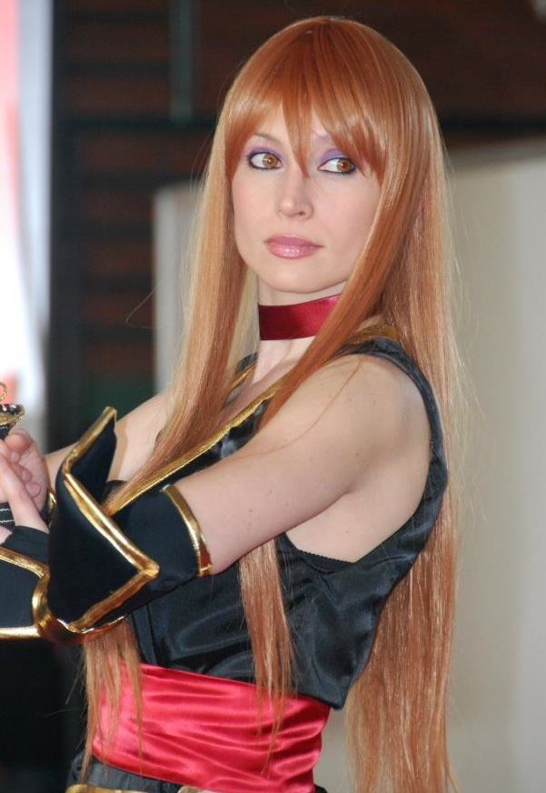 Giorgia Vecchini cosplay interpreta Kasumi del videogame "Dead or Alive"